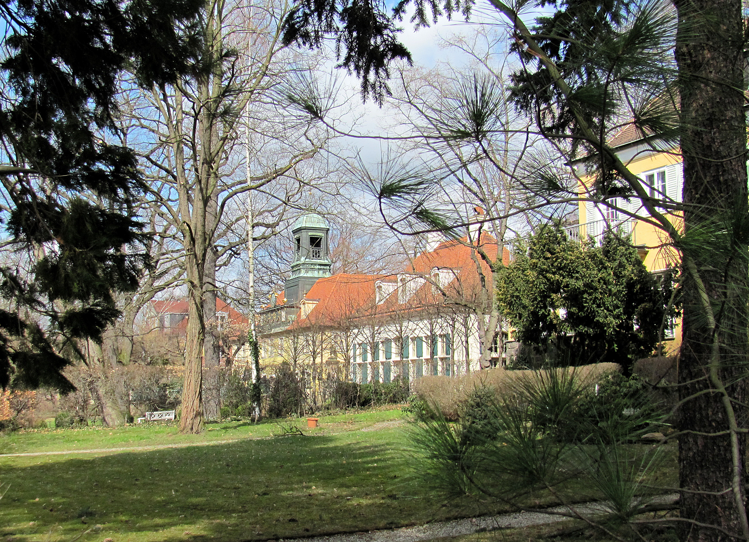 Radebeul-Oberlößnitz, Haus Sorgenfrei mit Turmaufbau, rechts der Gartensaal und links das Gärtnerhaus. Ganz links die benachbarte Villa Steinbach. Über das Grundstück von Einfamilienhaus Alfred Schädler (ganz rechts) hinweg gesehen.